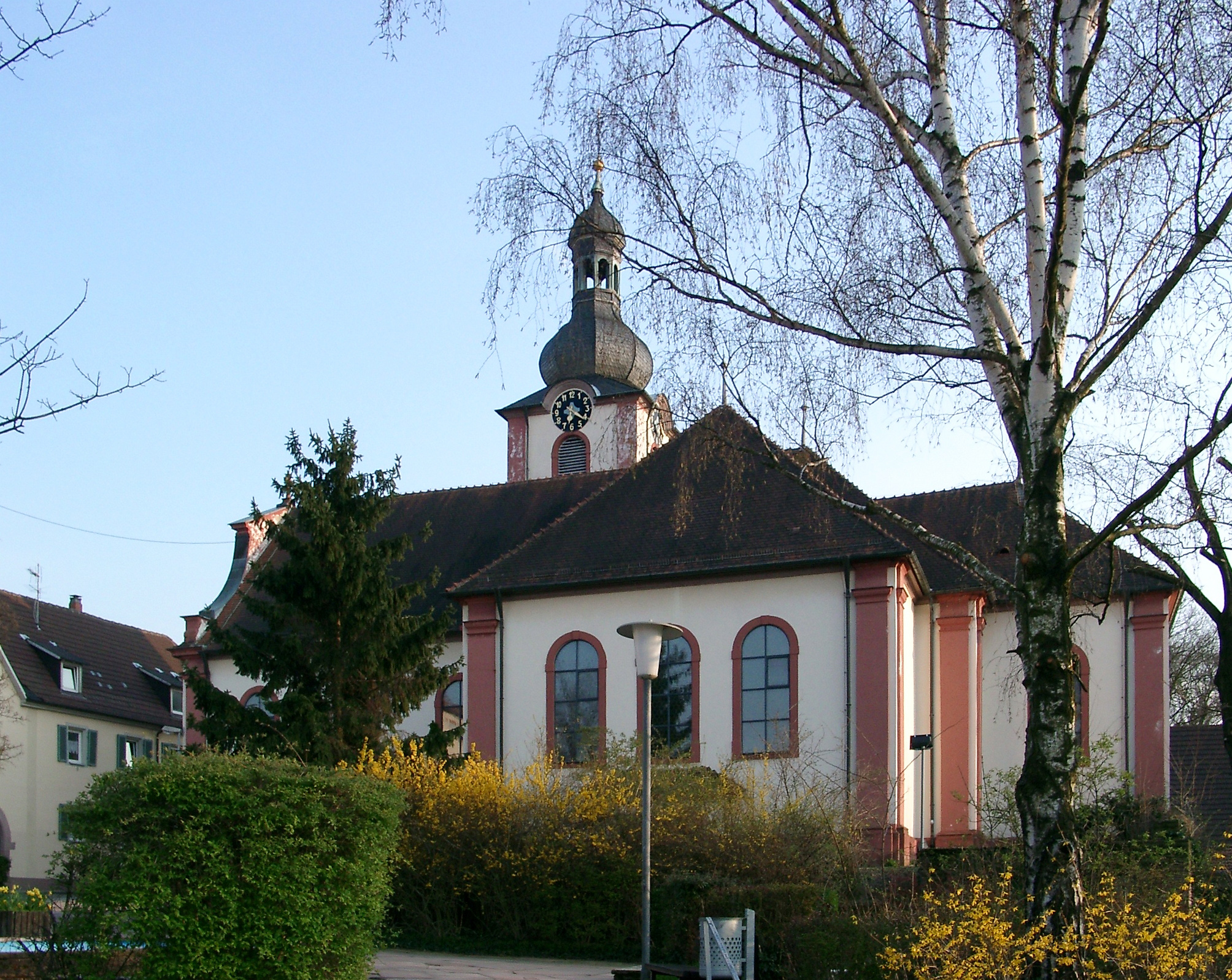 Nußloch, Kirche der Katholischen Gemeinde St. Laurentius